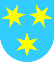 Coat of arm of Celje